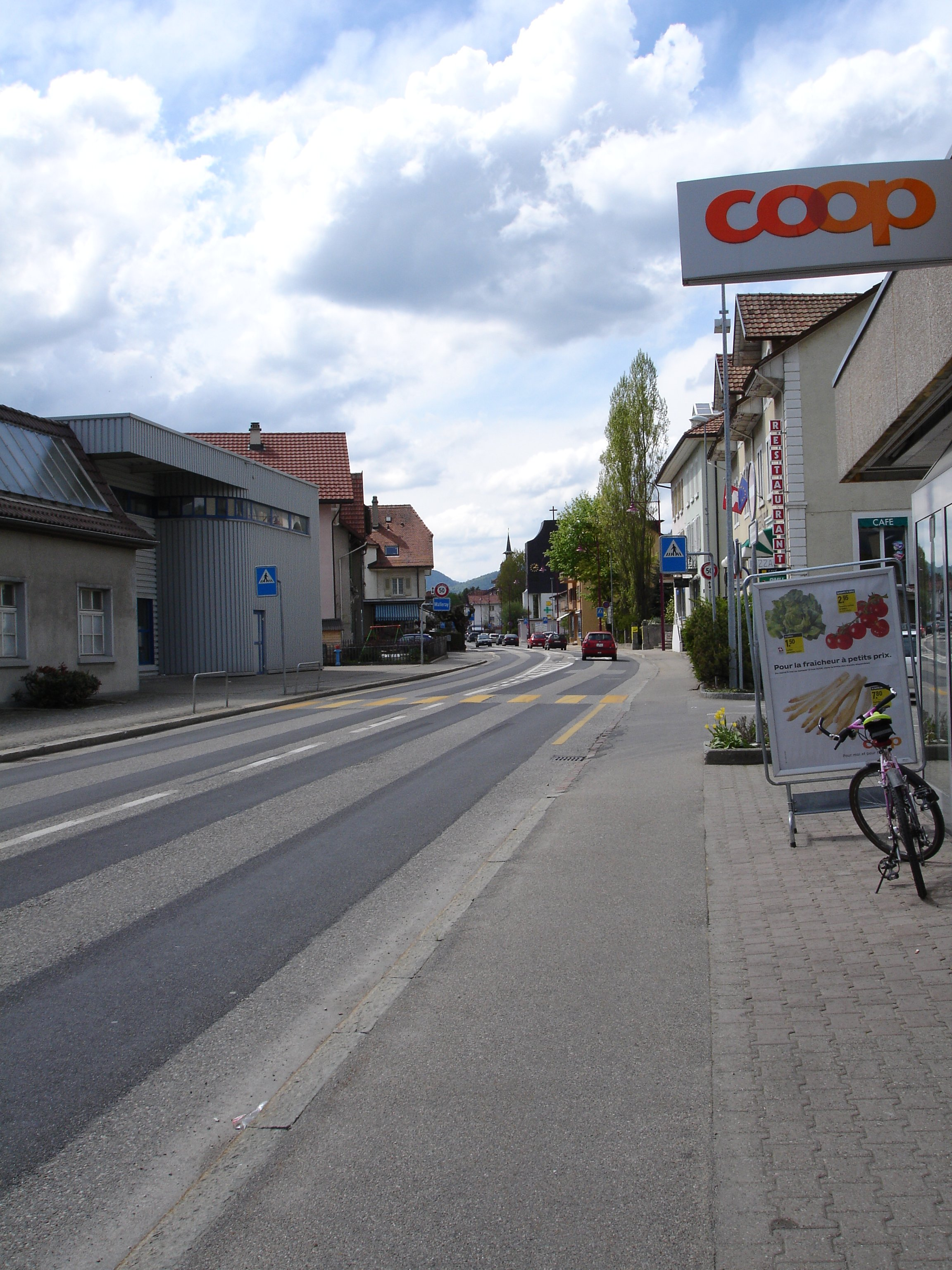 Vue de l'entrée Est de Malleray, prise depuis Bévilard